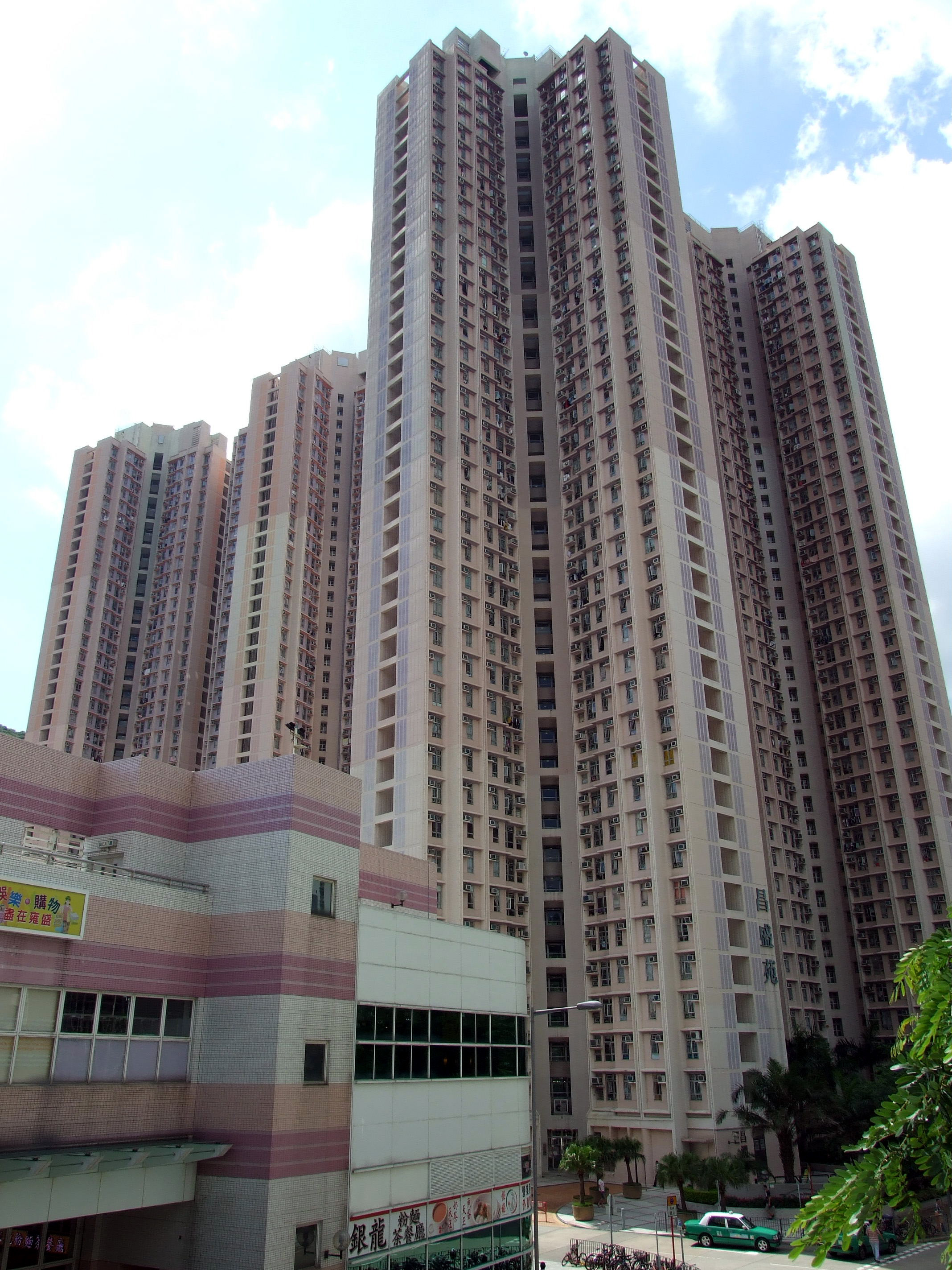 中文（香港）: 昌盛苑